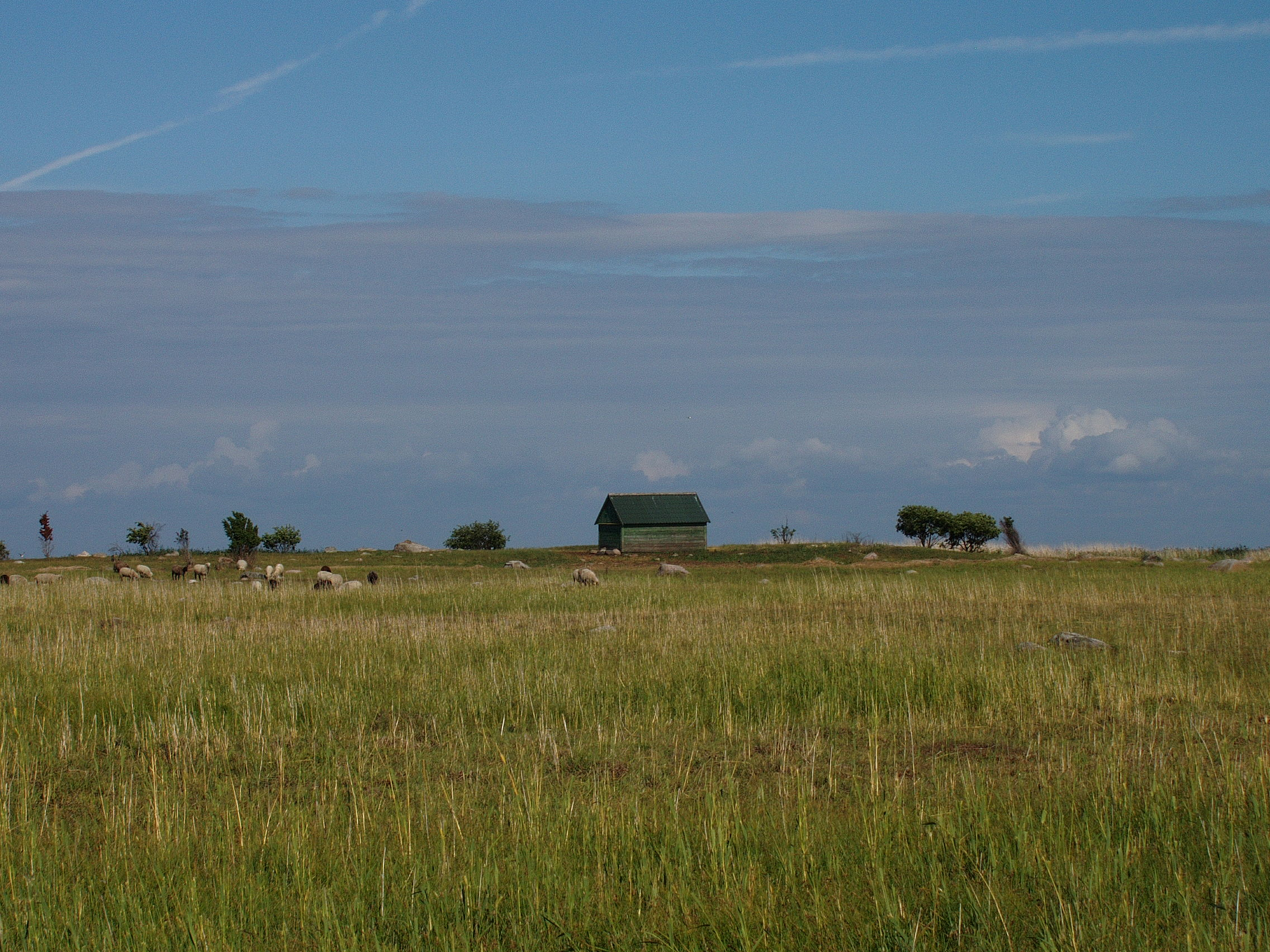 Manija maastikukaitseala